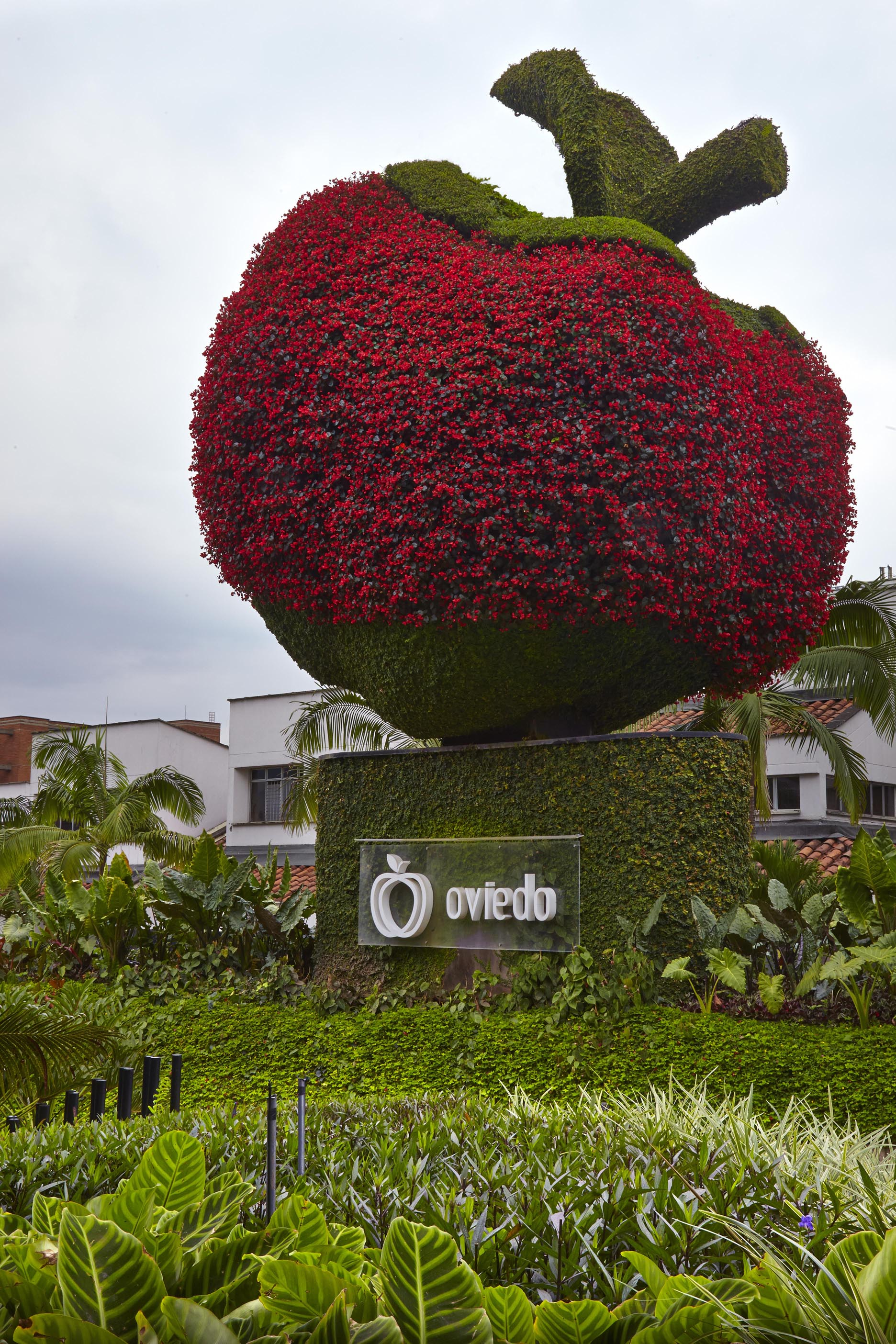 manzana roja